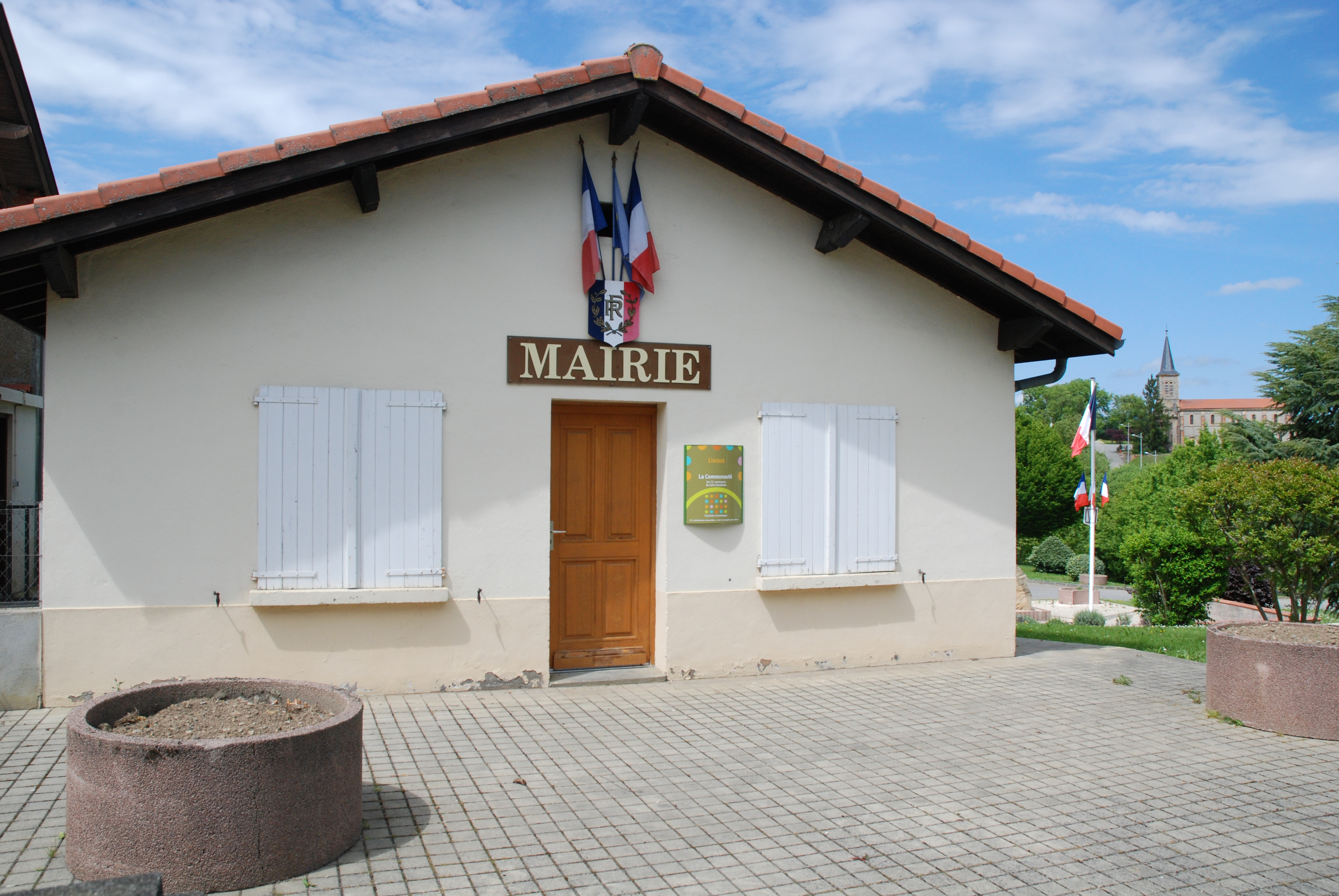 La mairie de Liéoux (Haute-Garonne, France).